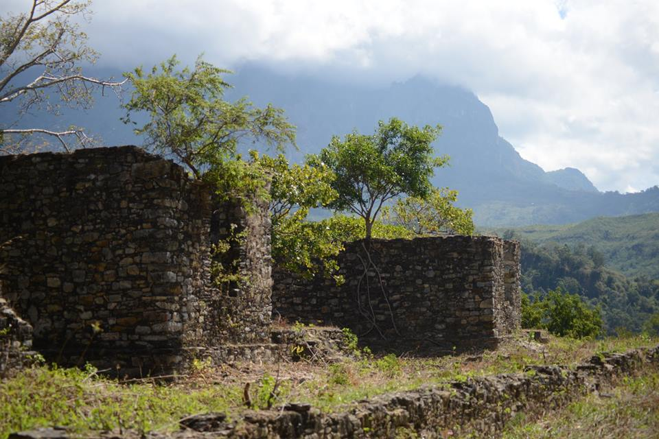 Ruinas Maboro